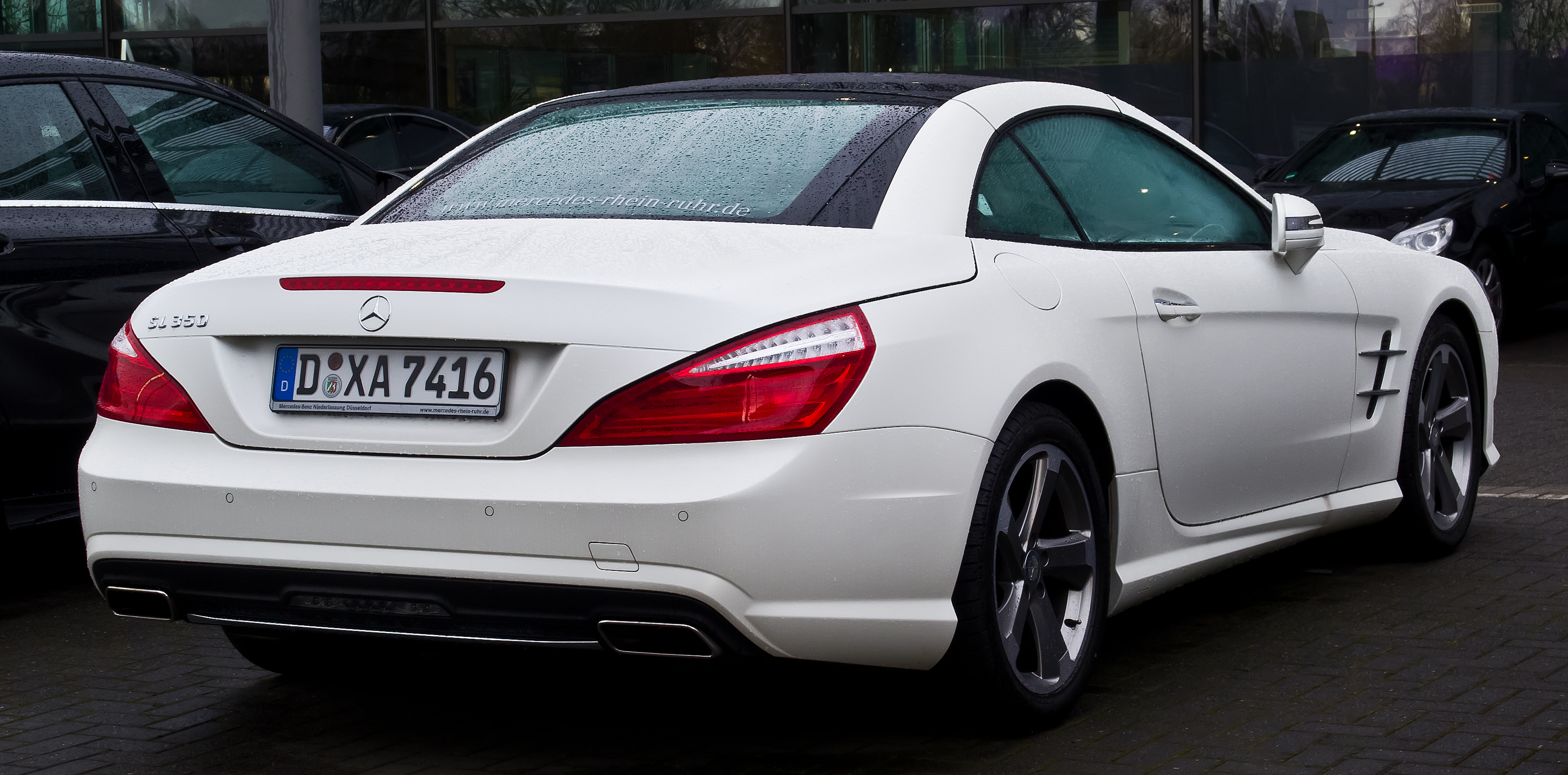 Mercedes-Benz SL 350 AMG Line (R 231)